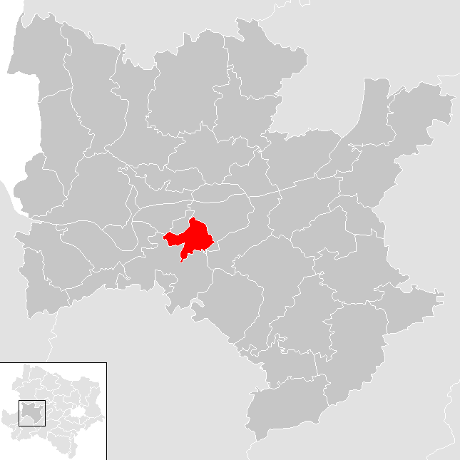 Bezirk Melk